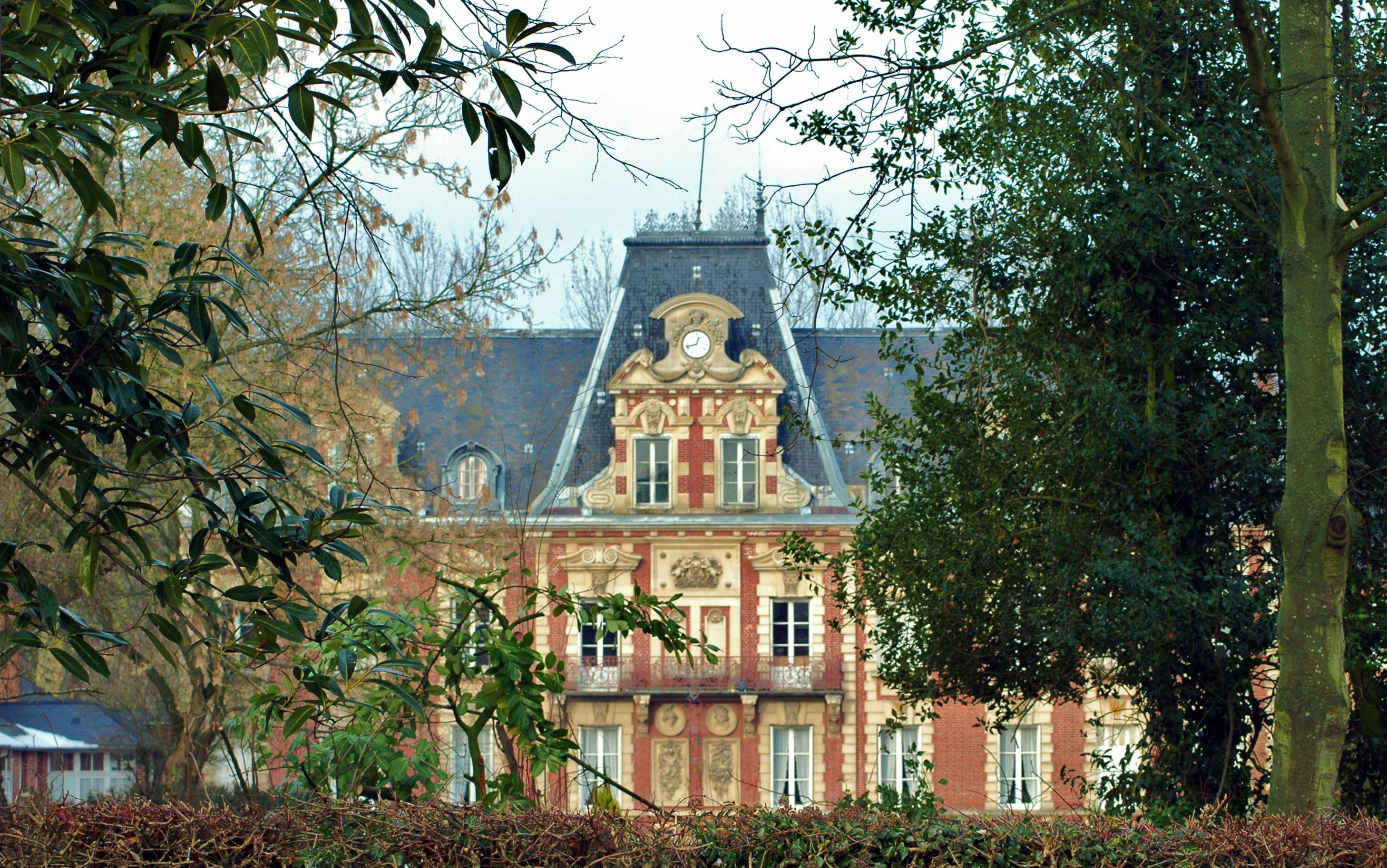 Rieux (Seine-Maritime, France) - Le manoir. .